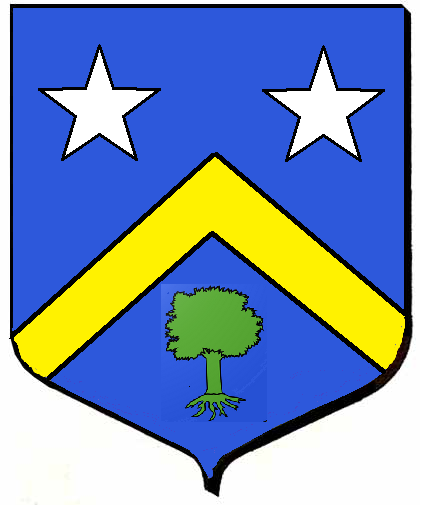 Blason de la famille de Périer de Gurat, maire d'Angoulême, seigneur de Gurat.